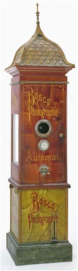 Bosco-Automat hochkant